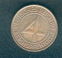 "Brüningtaler", 4 Reichspfennig Kursmünze 1932, Sammlermünze, kurioser Nennwert